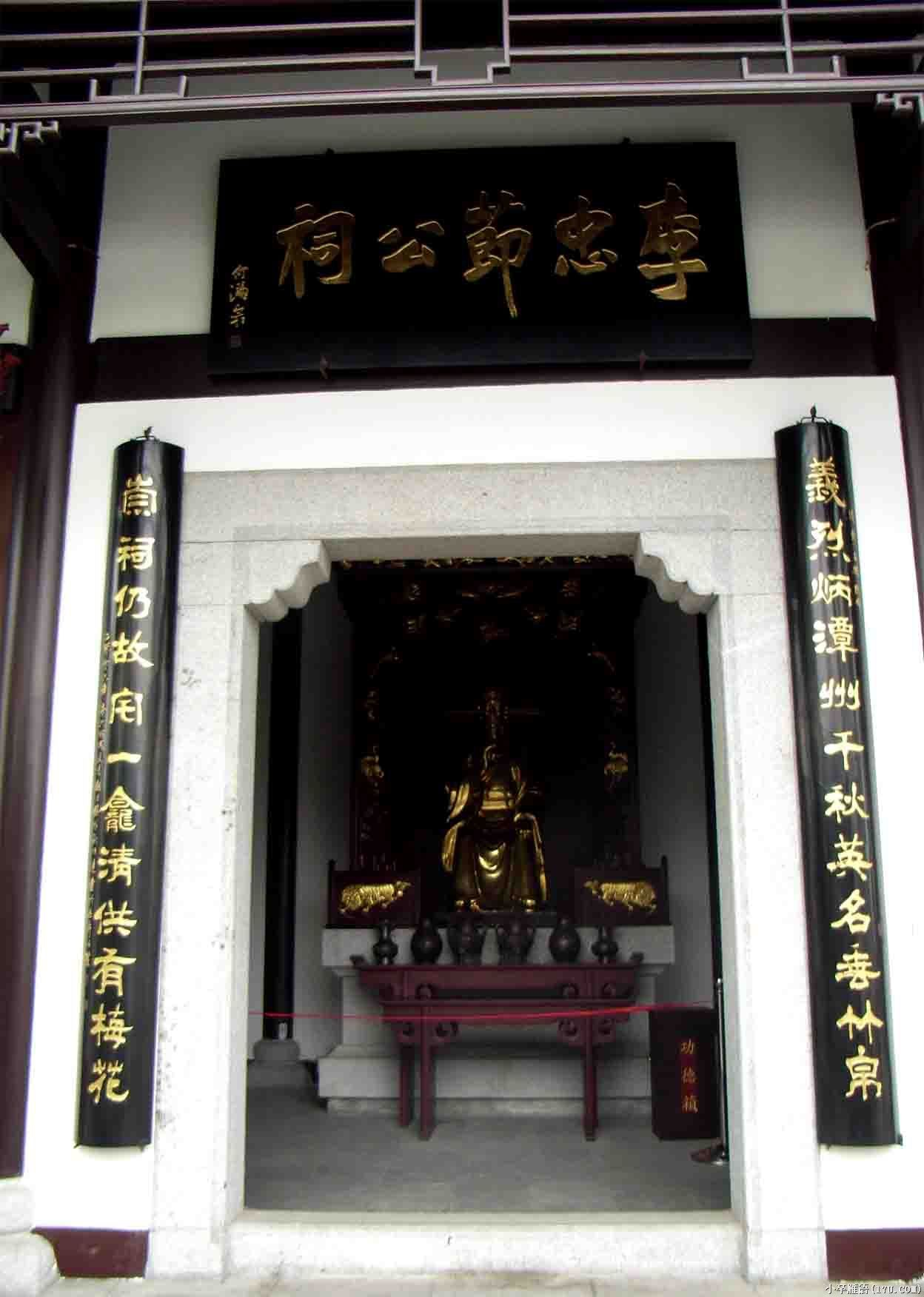 主祭祀李芾